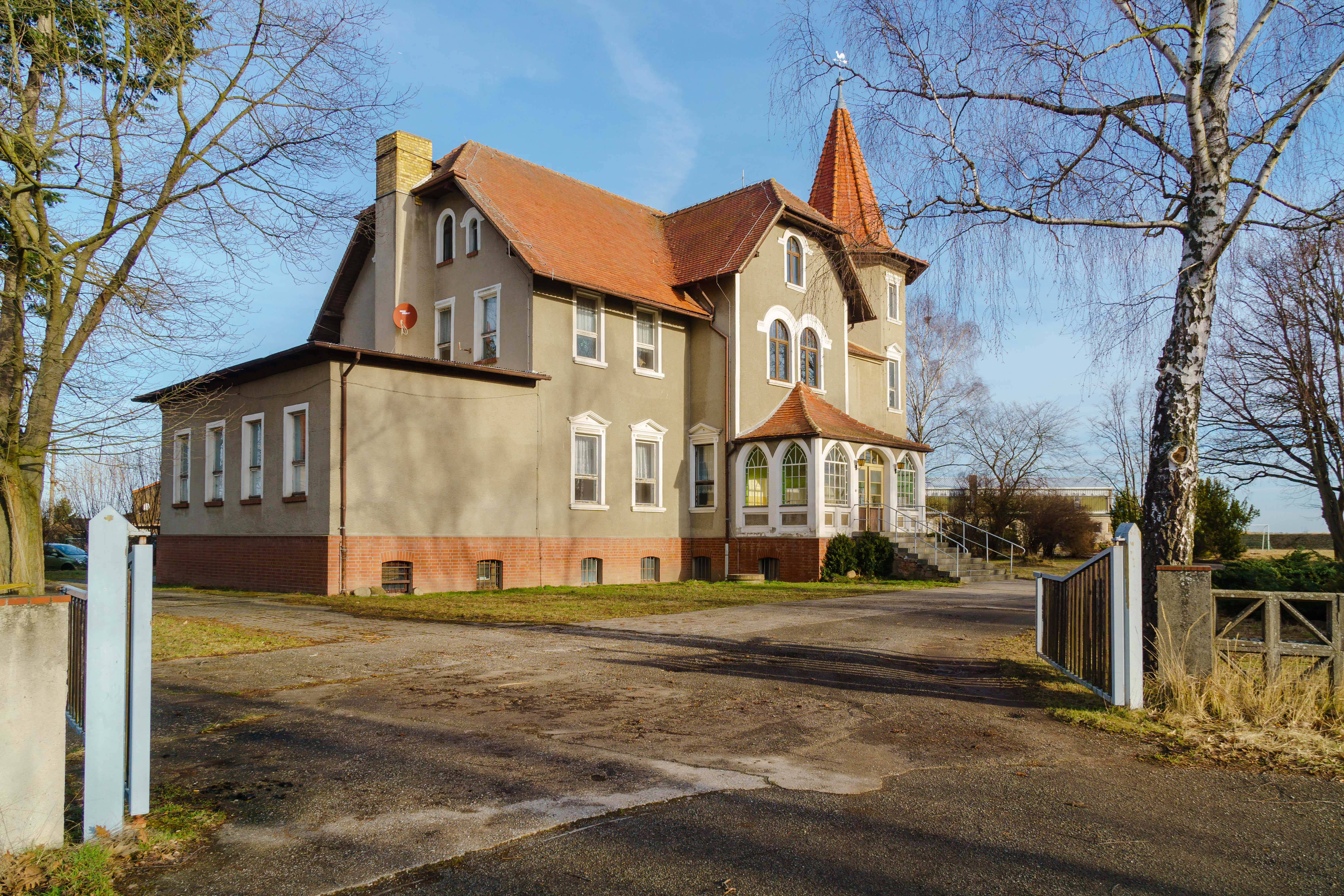 Ehemaliges Neues Herrenhaus, sogenanntes Schloss des Ritterguts (Erbrichtergut), Falkenberger Straße 3 in Laußig OT Pressel